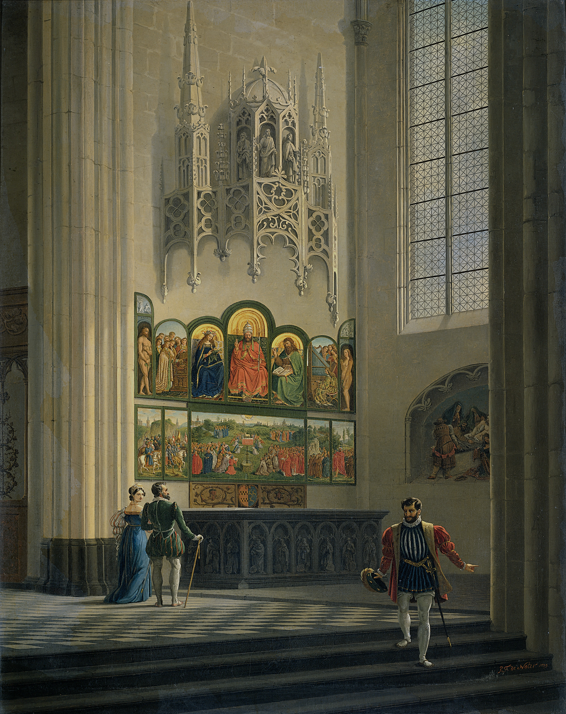 Het schilderij het Lam Gods van de gebroeders van Eyck in een kapel van de Sint Bavo te Gent, in een middeleeuwse tafereel met enkele figuren.